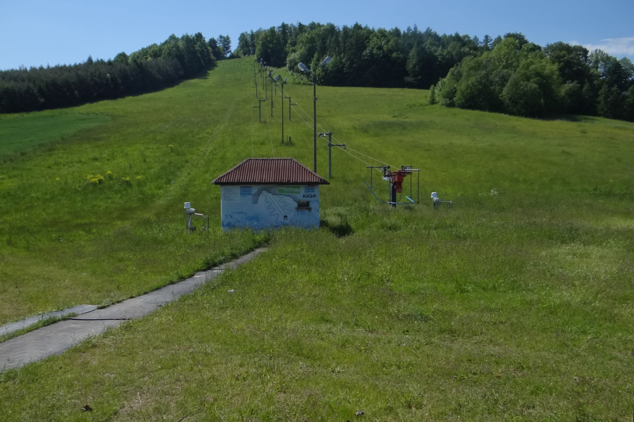 Smoleń (województwo śląskie)